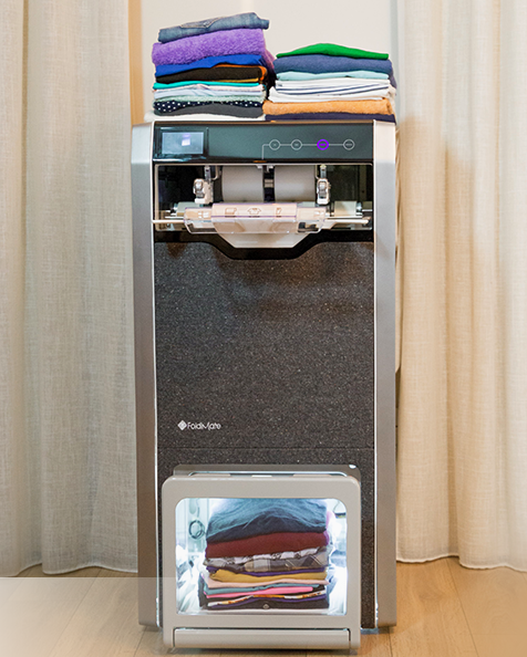 Debbie Cohen-Abarvanel